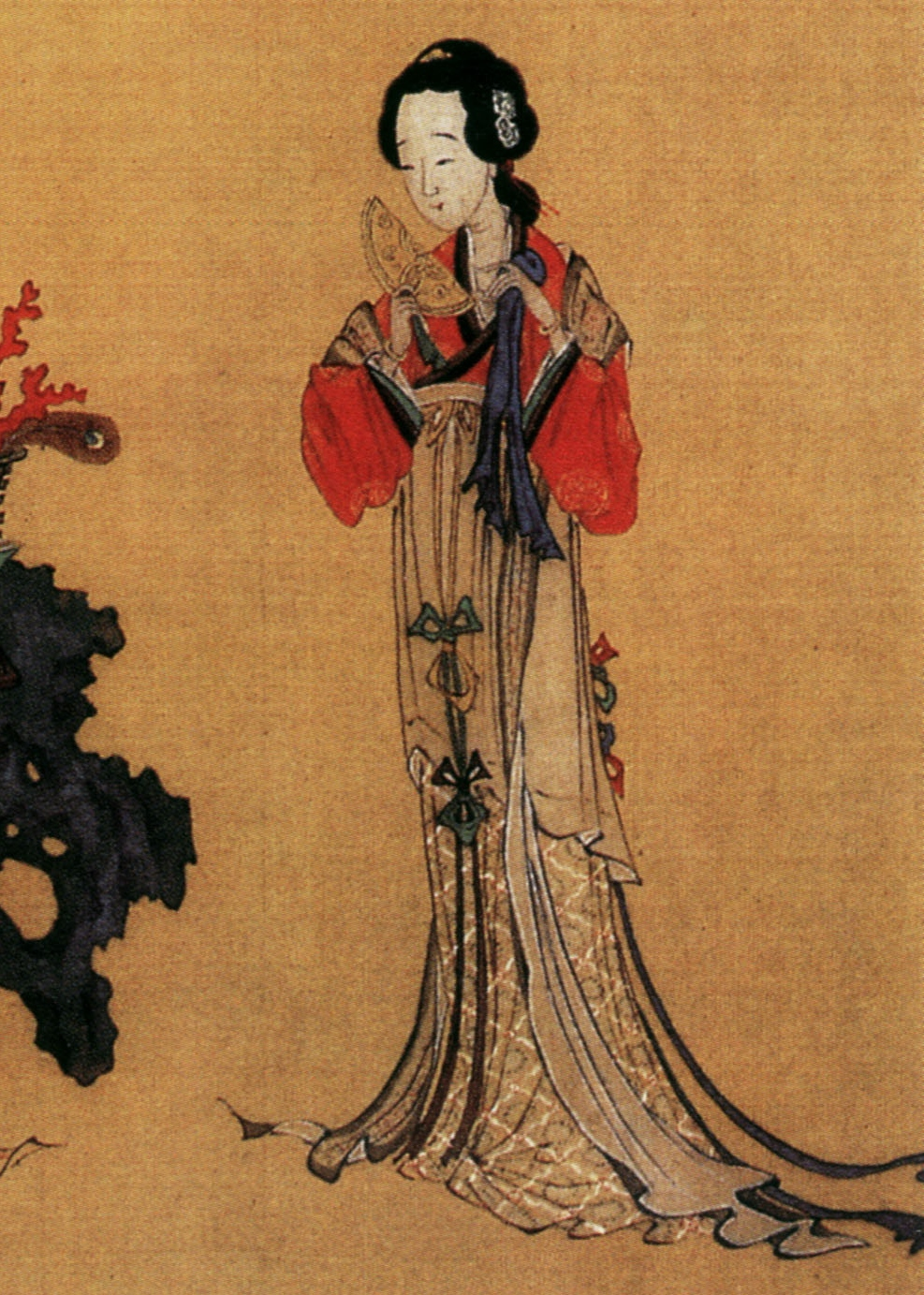 中文（香港）: 《千秋絕豔圖》中的樂昌公主